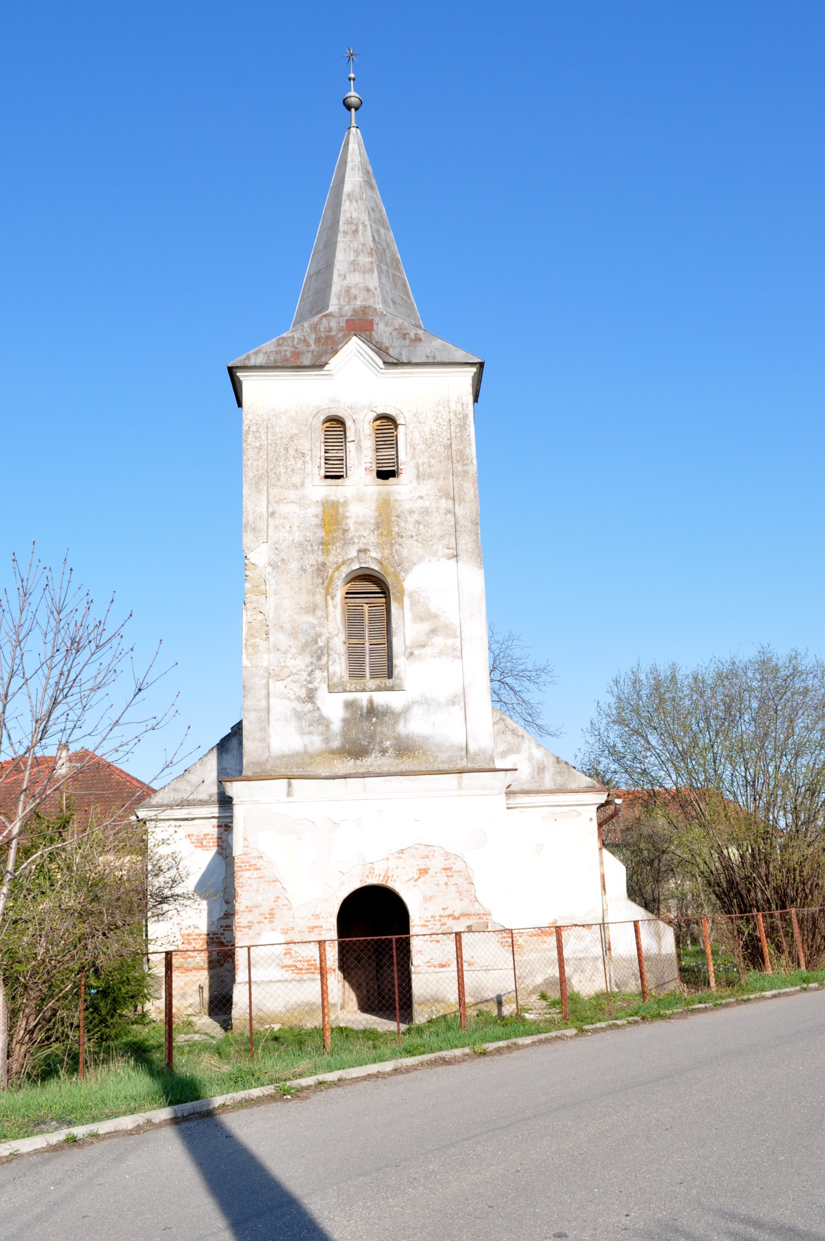 Biserica reformat-calvina Ilia, județul Hunedoara